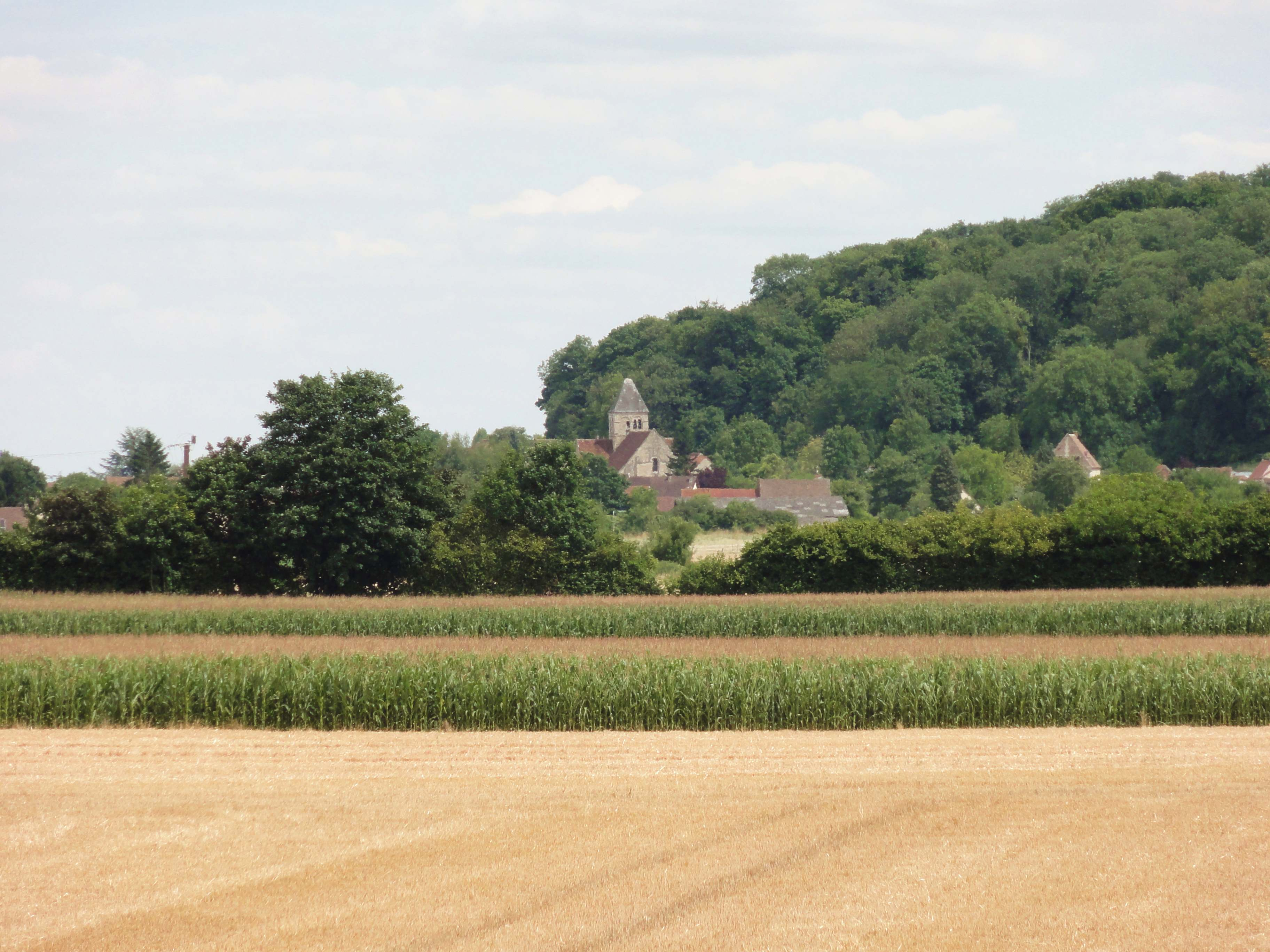 Église Saint-Michel-et-Saint-Vaast de Catenoy (voir titre).